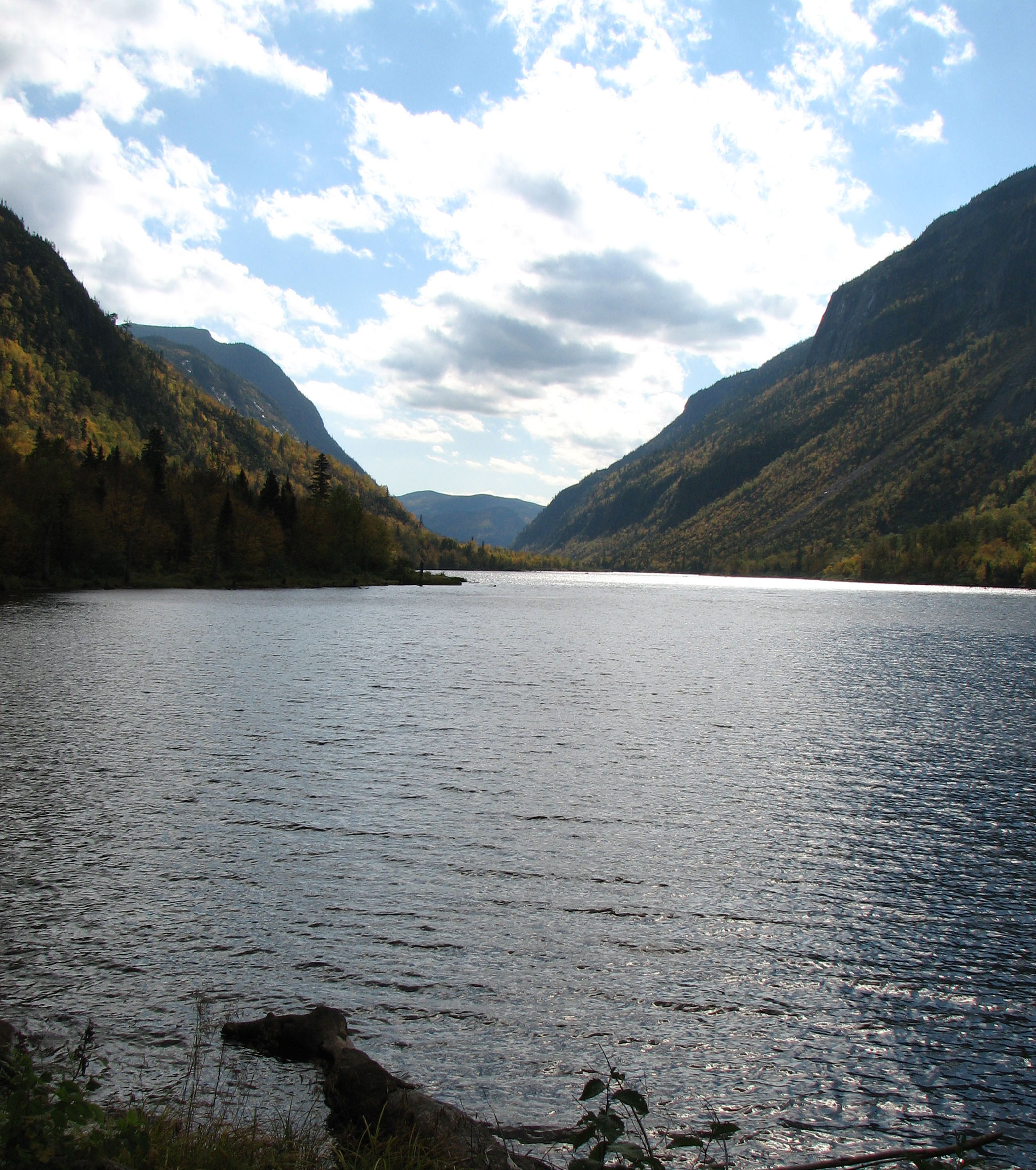 Parc national Hautes-Gorges-de-la-Rivière-Malbaie